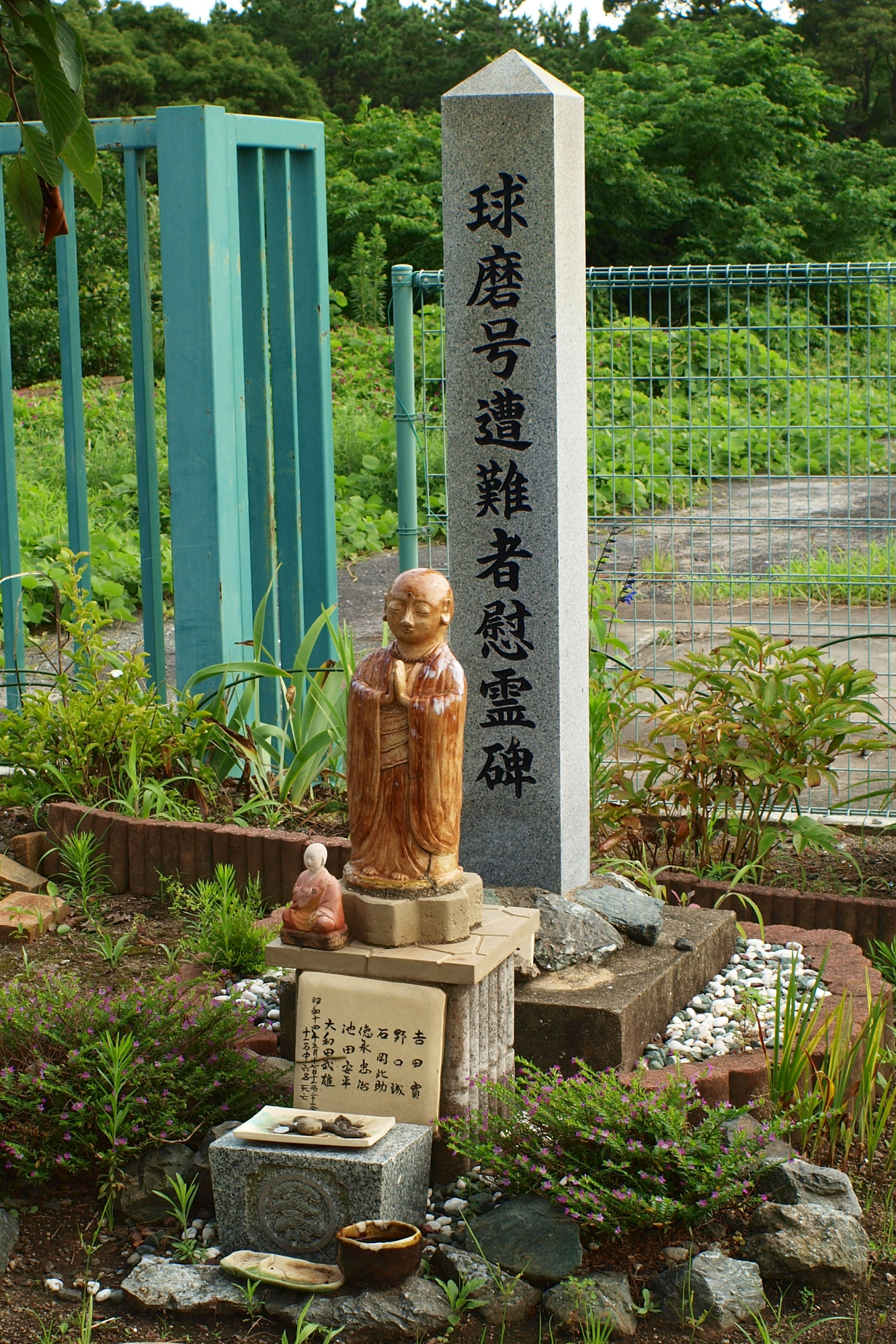 福岡県福岡市東区雁の巣 球磨号の慰霊碑